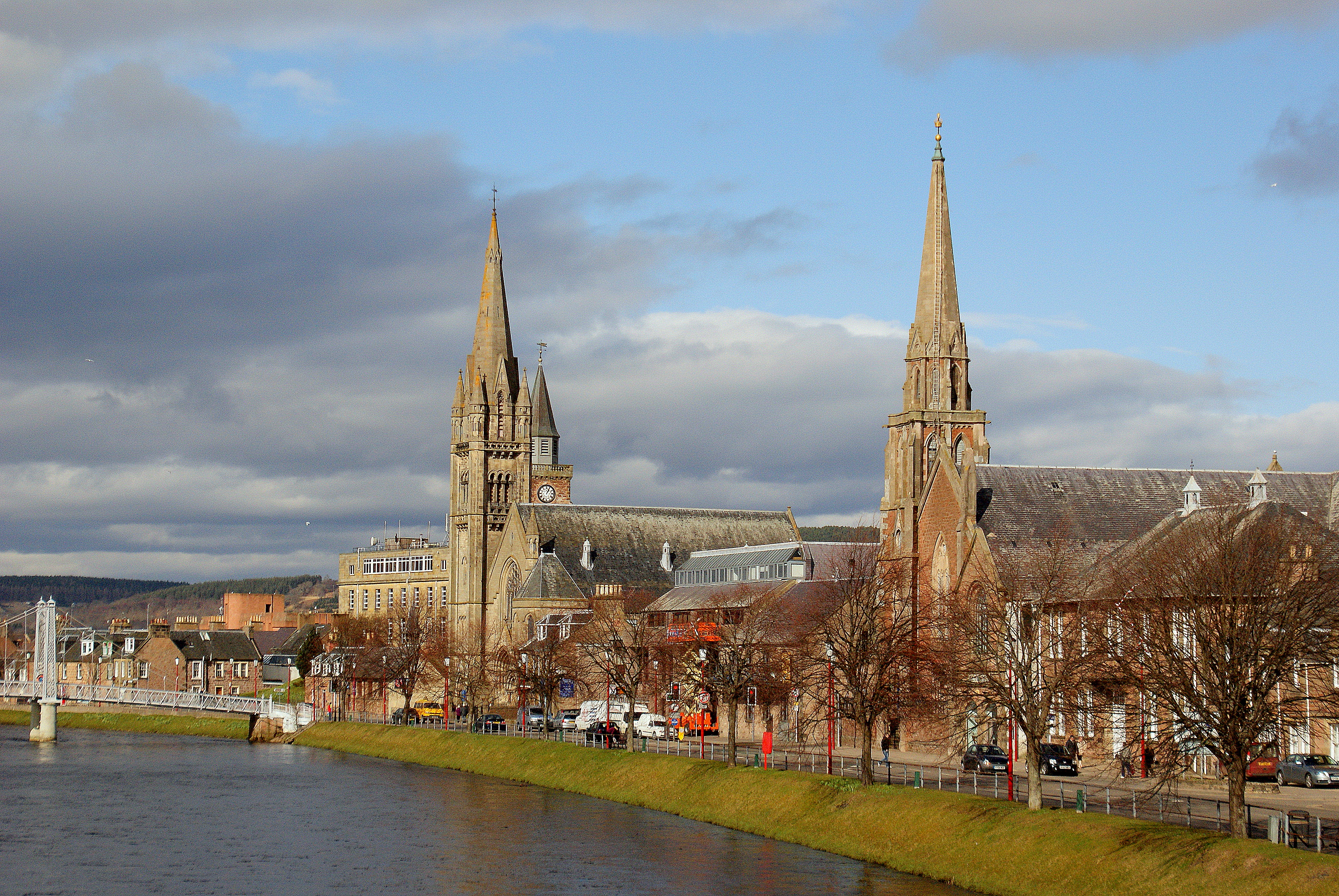 Inverness